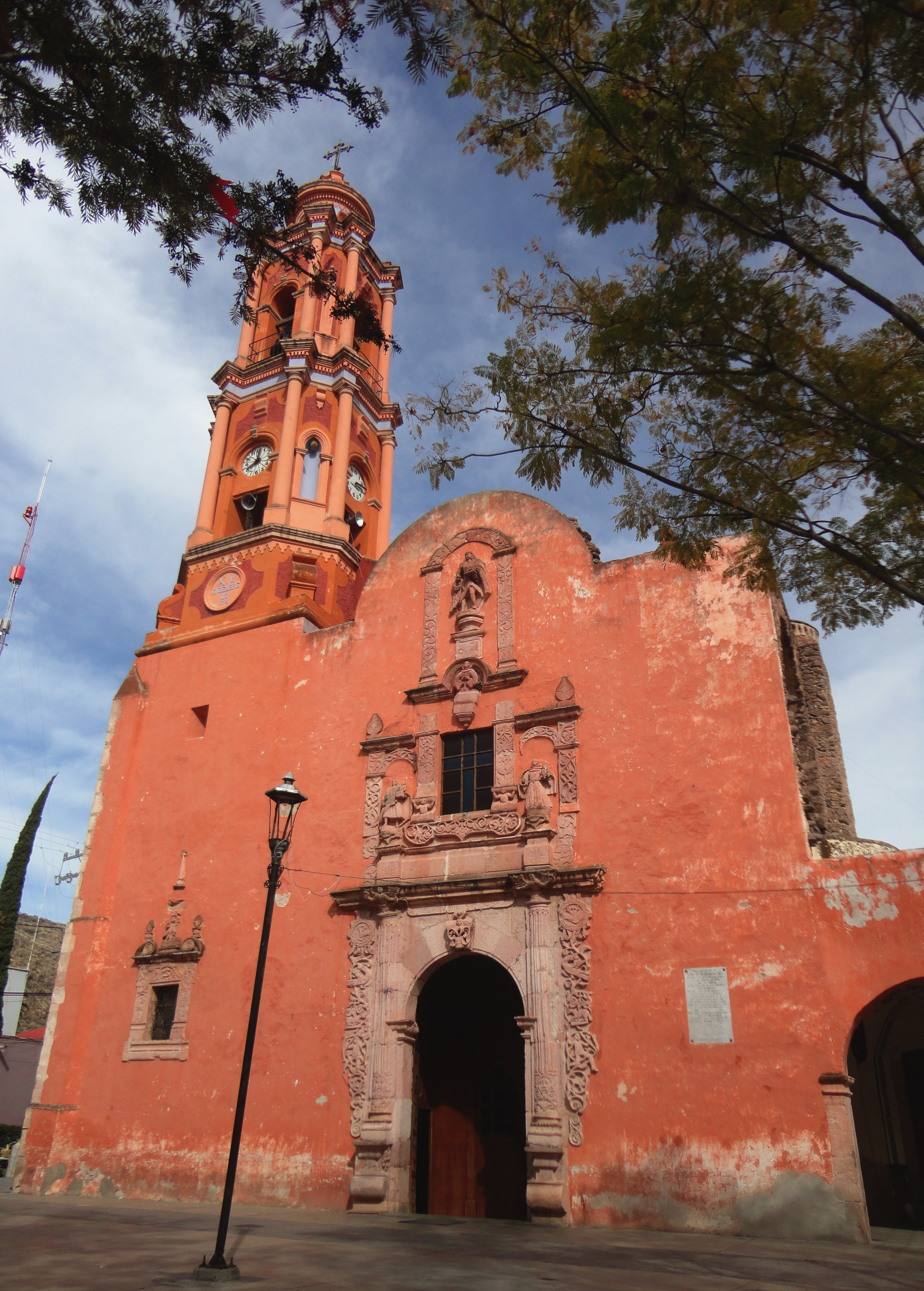 Parroquia de San Juan Bautista - Victoria, Guanajuato, México.